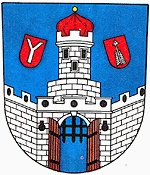 Znak obce Mašťov v okrese Chomutov